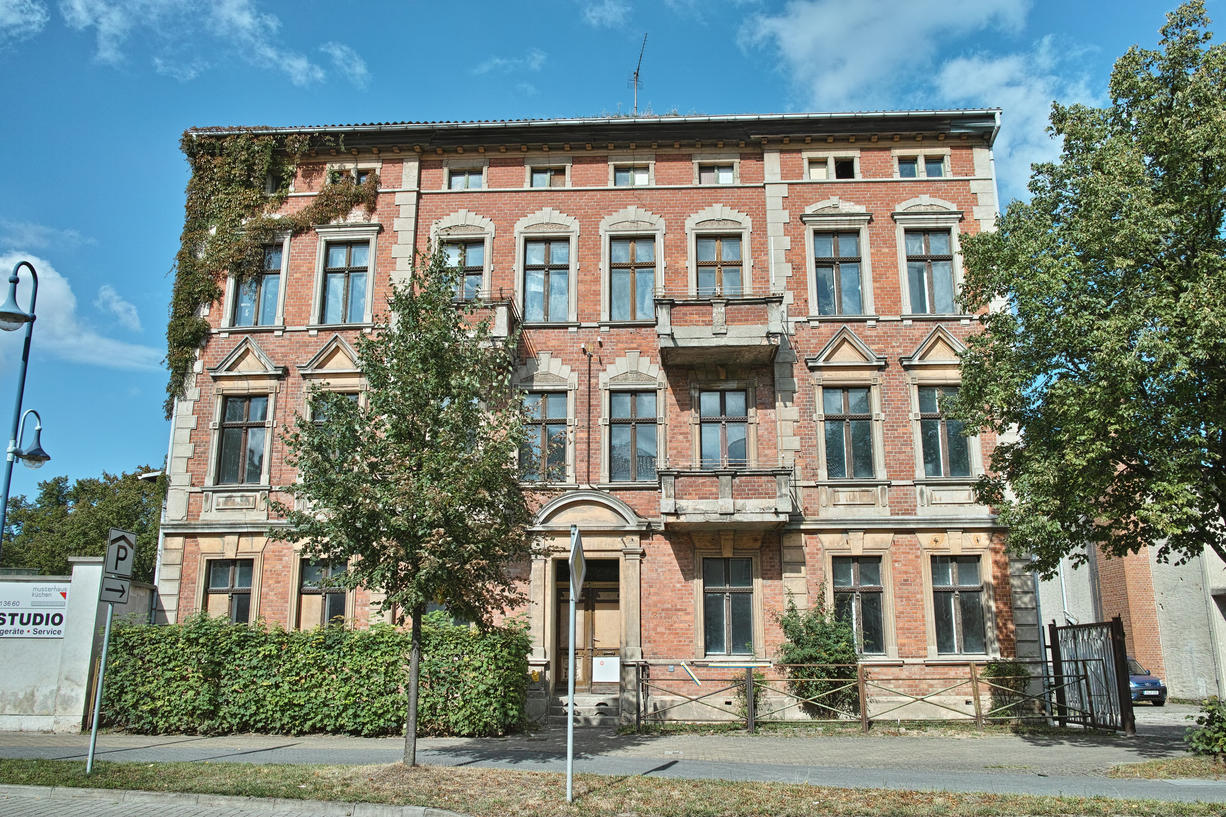 Wohnhaus mit Seitenflügeln